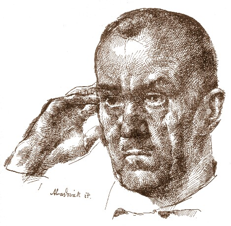 Aba-Novák Vilmos: Néhai Olgyai Viktor arcképe